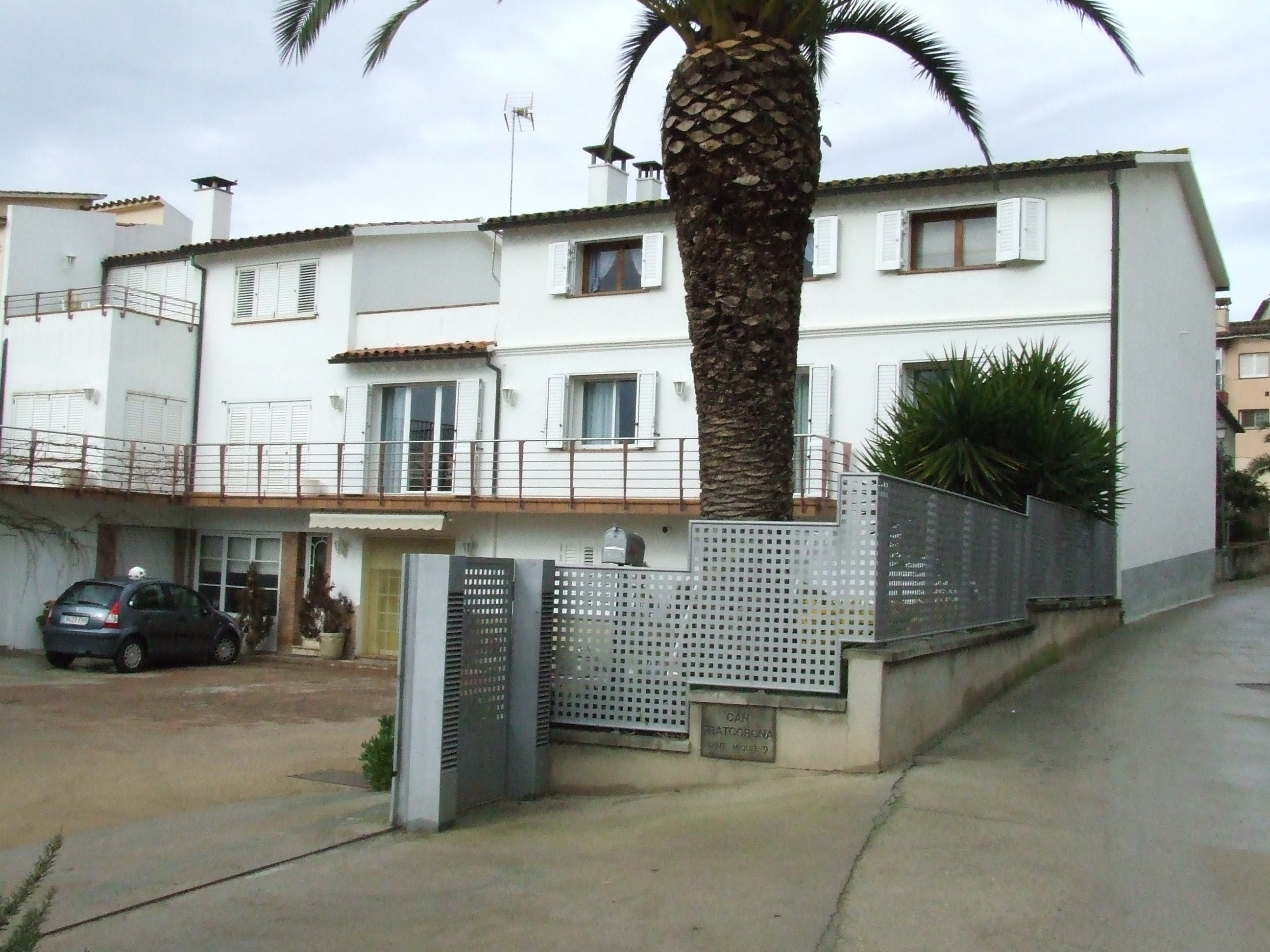 Can Pratcorona (Bigues, Bigues i Riells, Vallès Oriental)